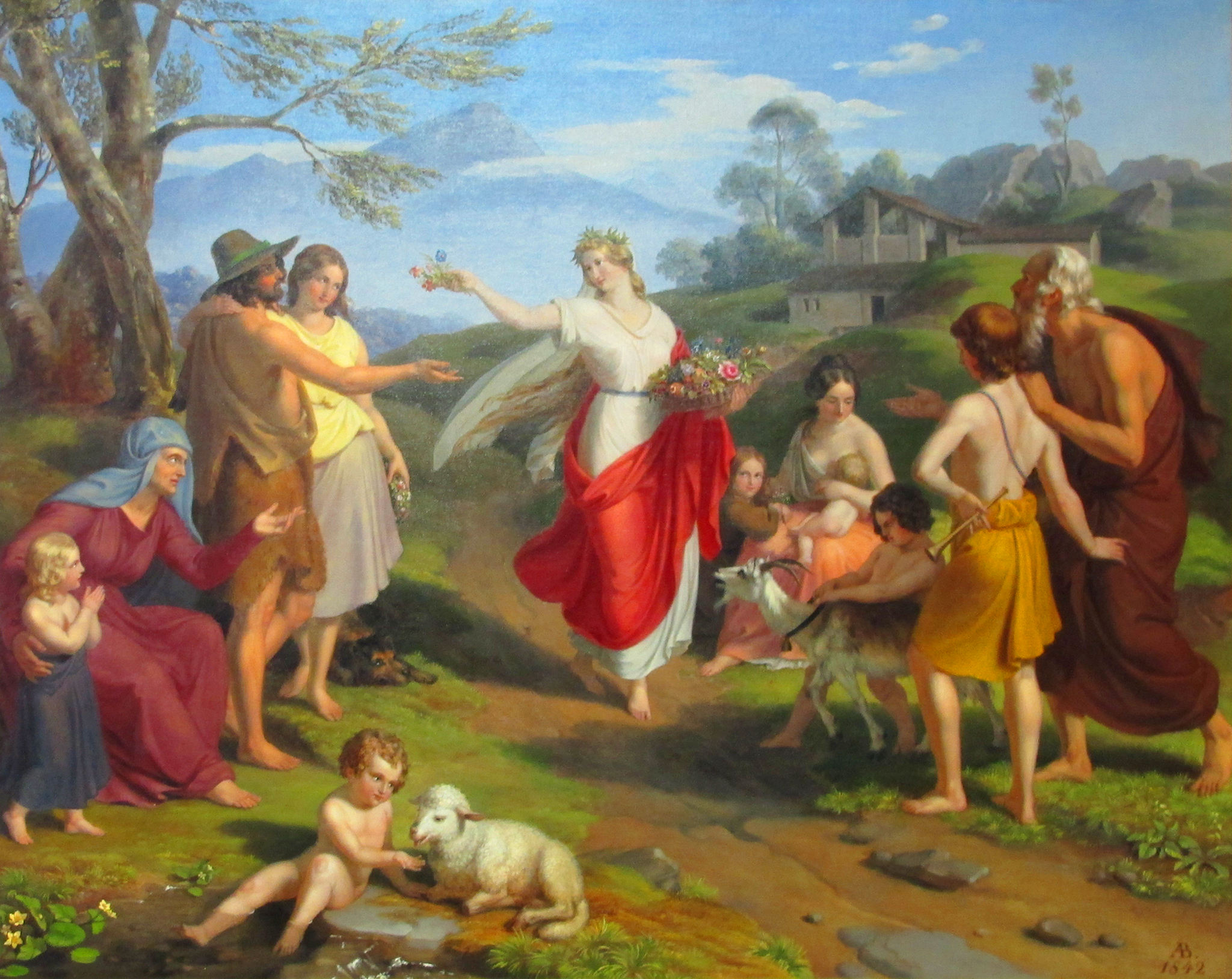 Allegorie des Frühlings. Öl/Leinwand (doubliert), 69 × 89,5 cm